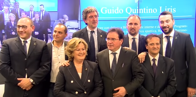 Giunta Regionale Abruzzese 2019-2024